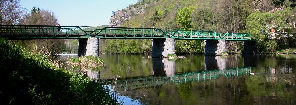 Brücke über die Thaya in Hardegg (Niederösterreich)